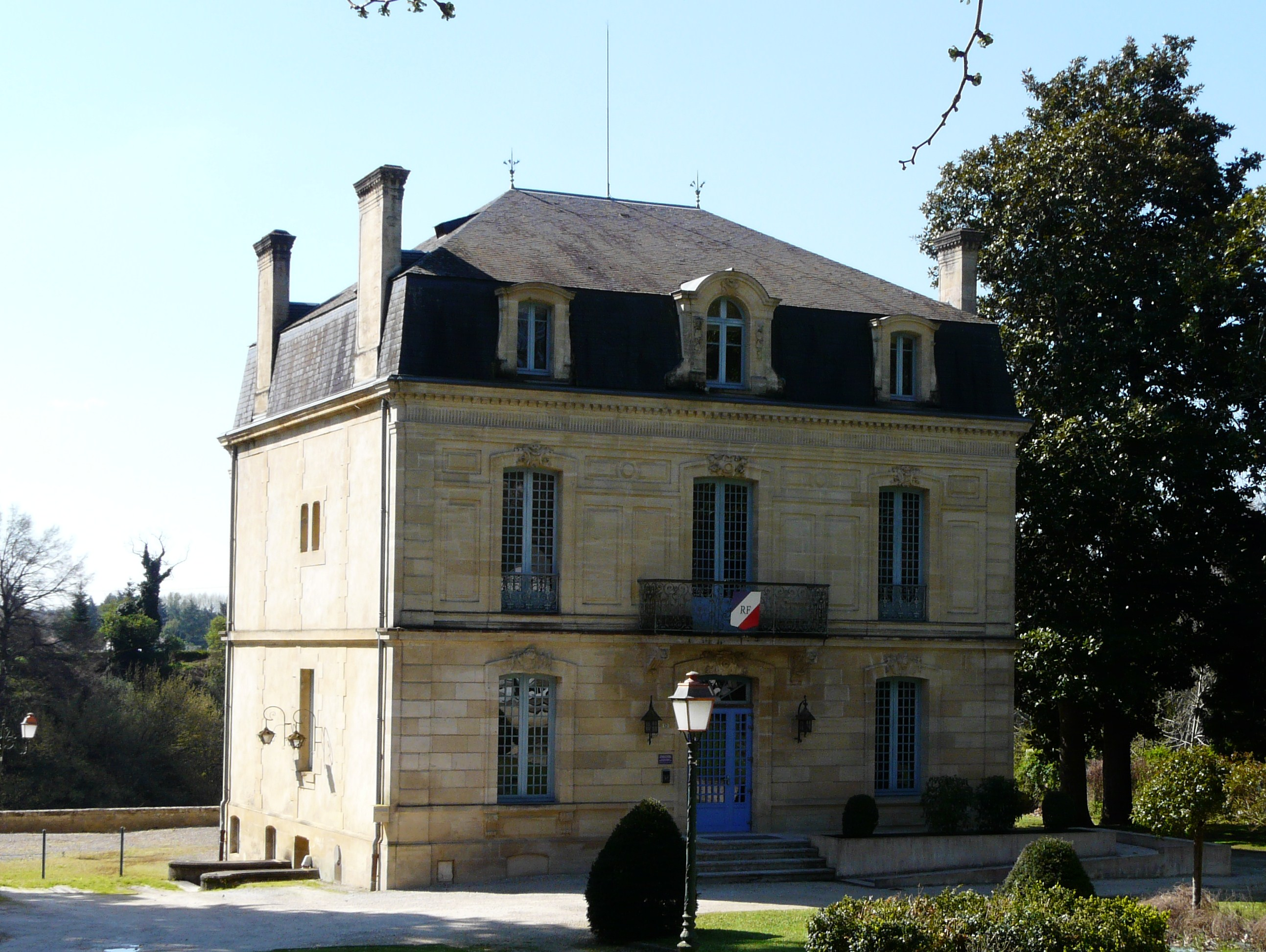 La mairie de Creysse, Dordogne, France